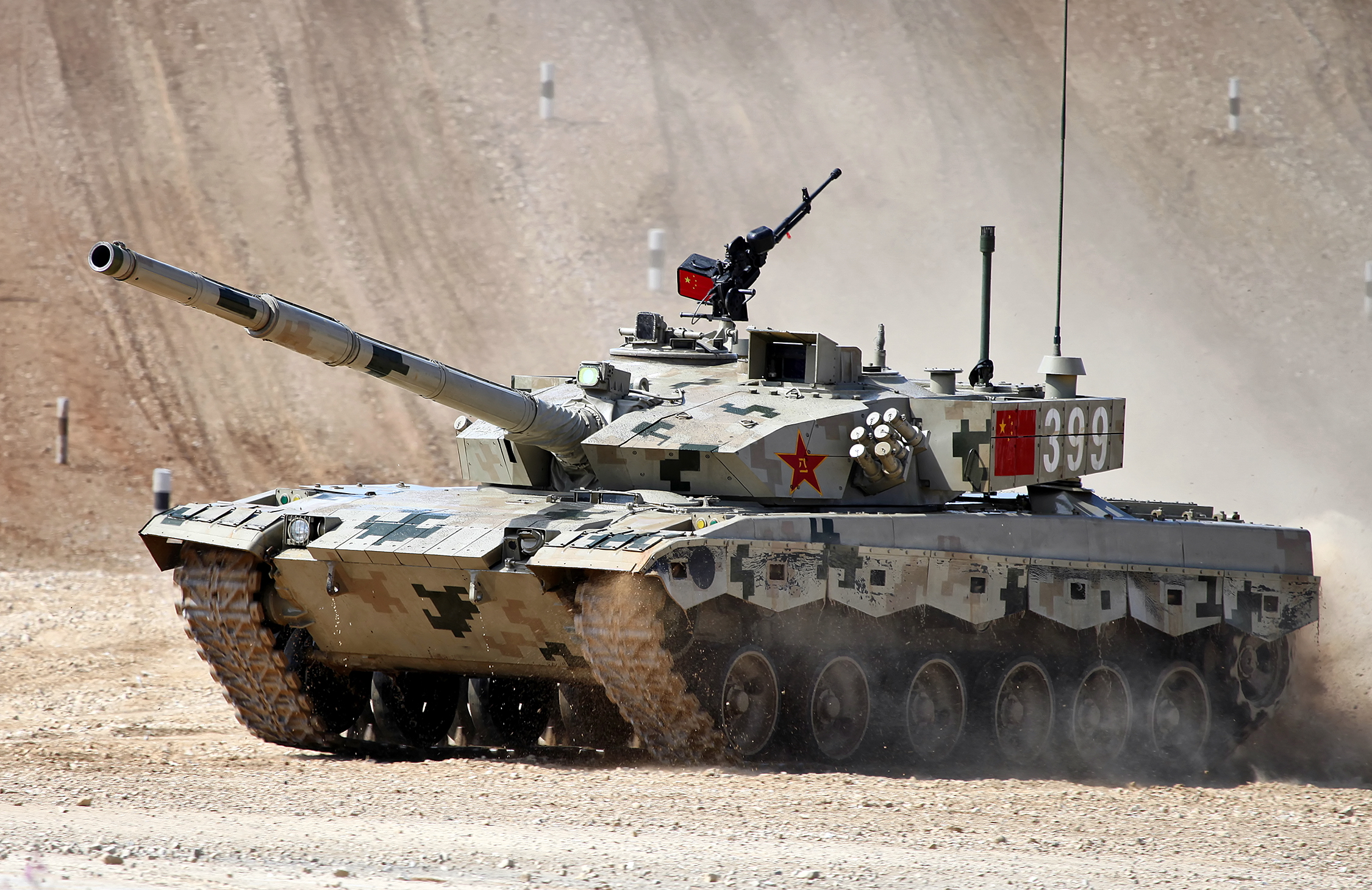 96B坦克参加俄罗斯"坦克两项-2017"比赛。